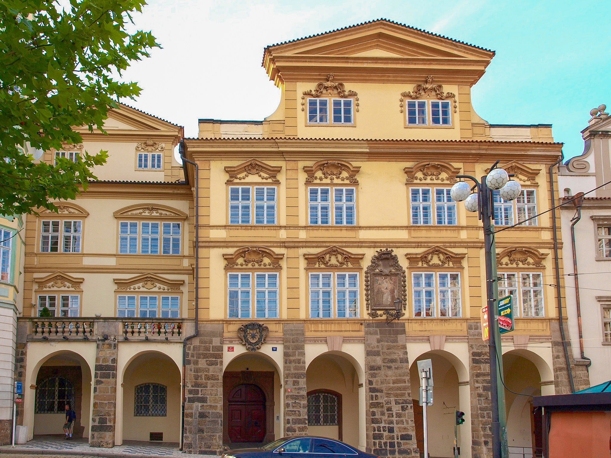 Šternberský palác, Malostranské náměstí